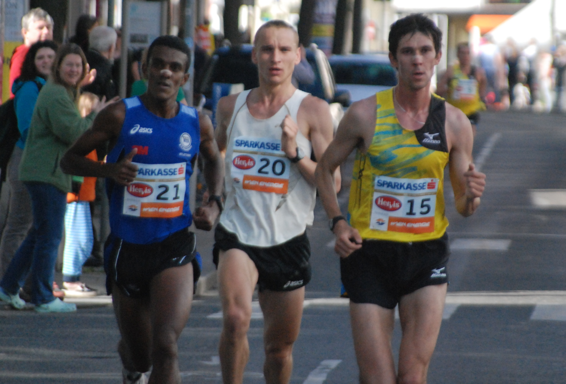 Sergio Silva, Valerijs Zolnerovics und Fedor Shutov beim Vienna City Marathon 2013 auf der Mariahilfer Straße im 15. Wiener Gemeindebezirk